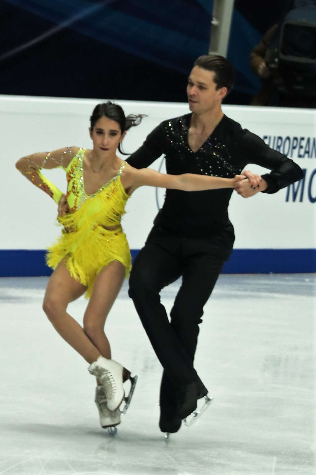 Кортни Мансур и Михал Чешка (Чехия) на Чемпионате Европы по фигурному катанию 2018